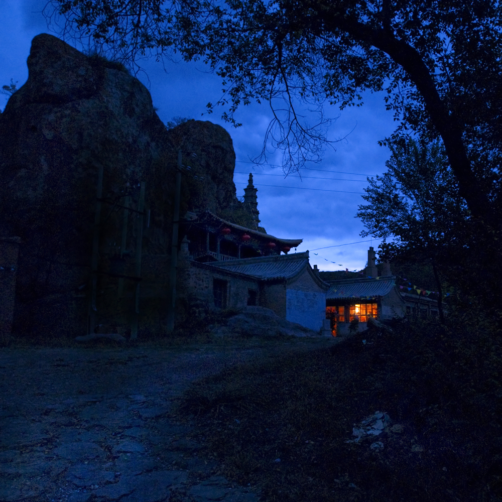 深山藏古寺 宣化辽柏林石佛寺